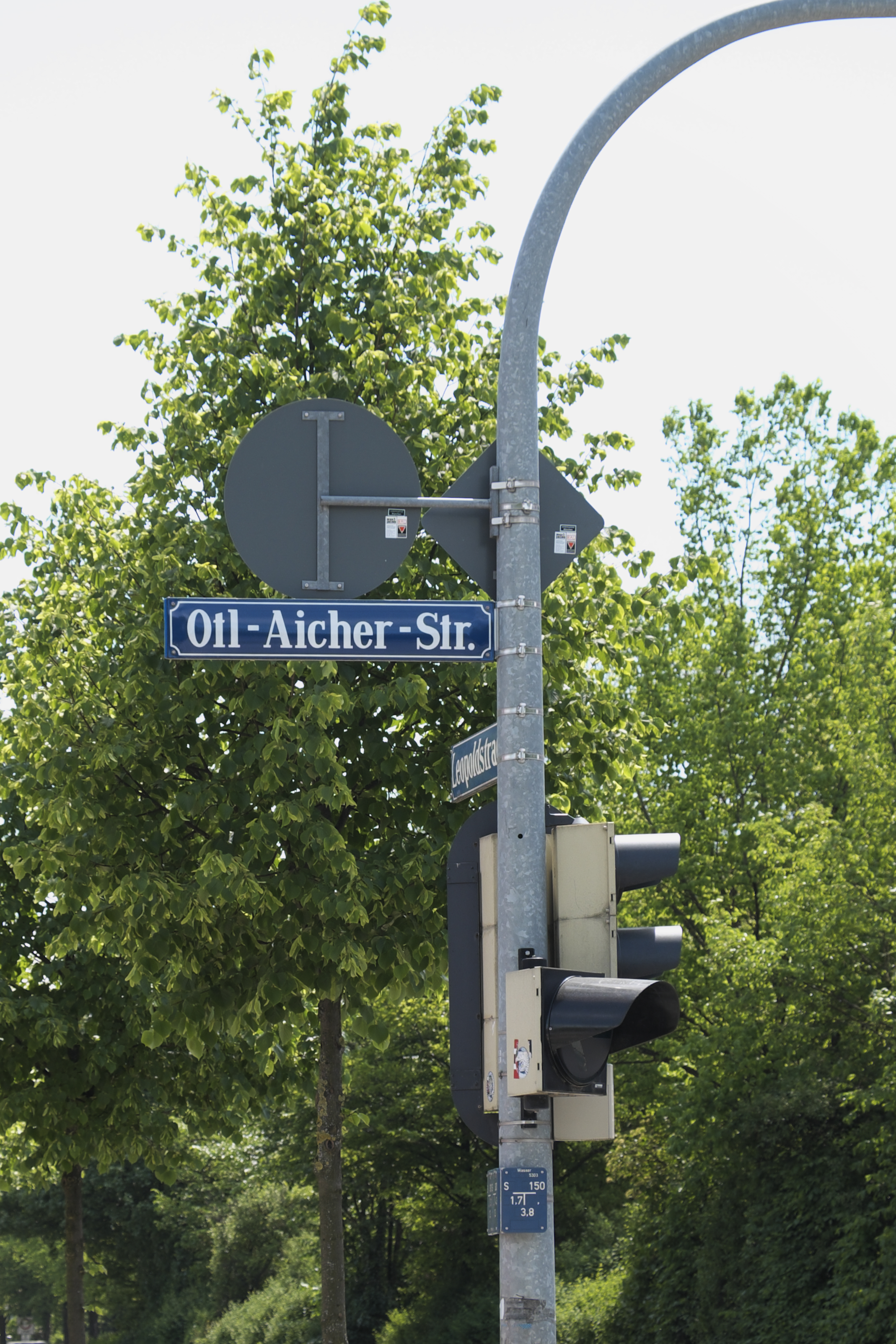 Straßenschild Otl-Aicher-Str. in Schwabing im Stadtbezirk Schwabing-Freimann in München (Bayern/Deutschland)